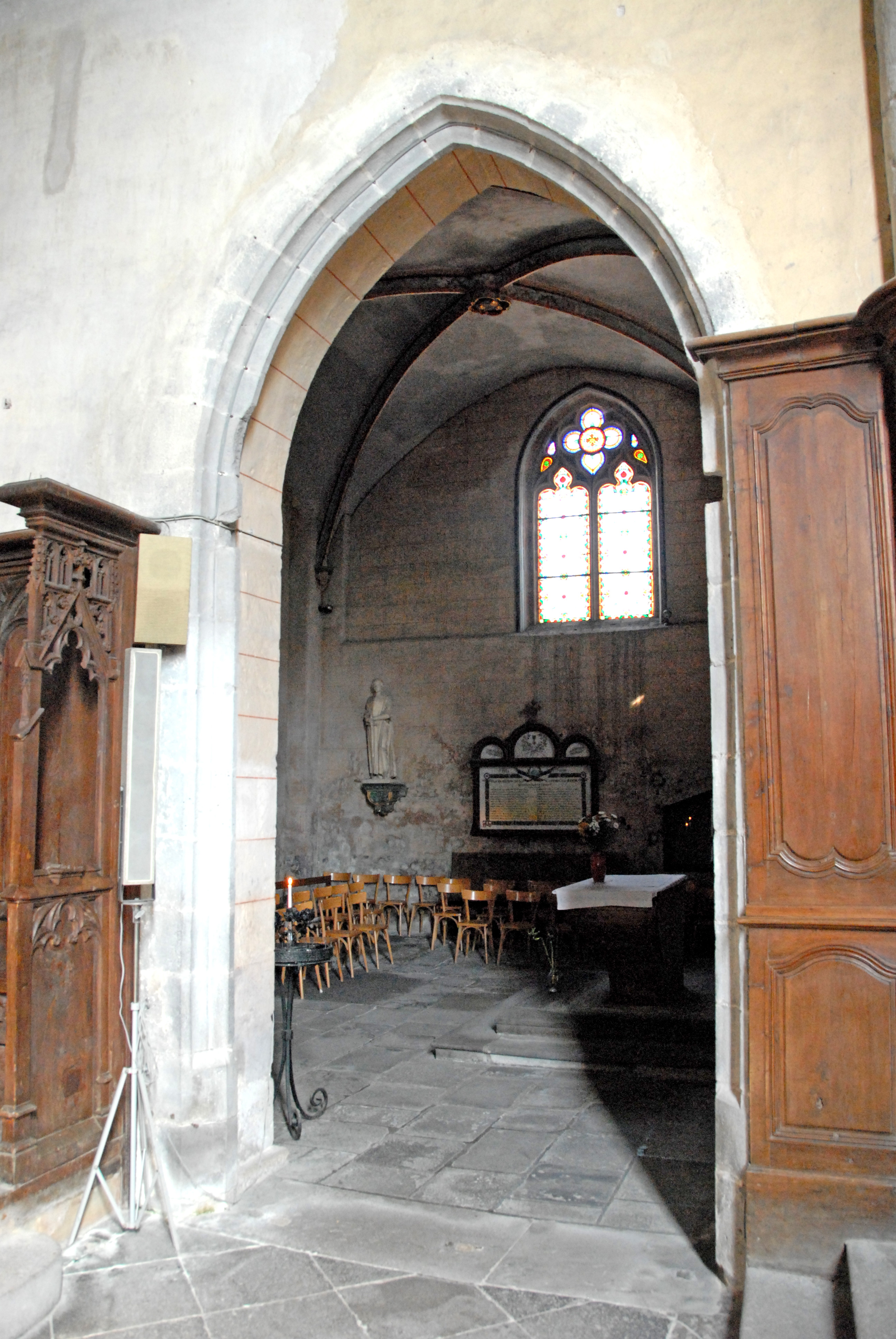 Mozac, Nördl. Querschiff aus Mittelschiff